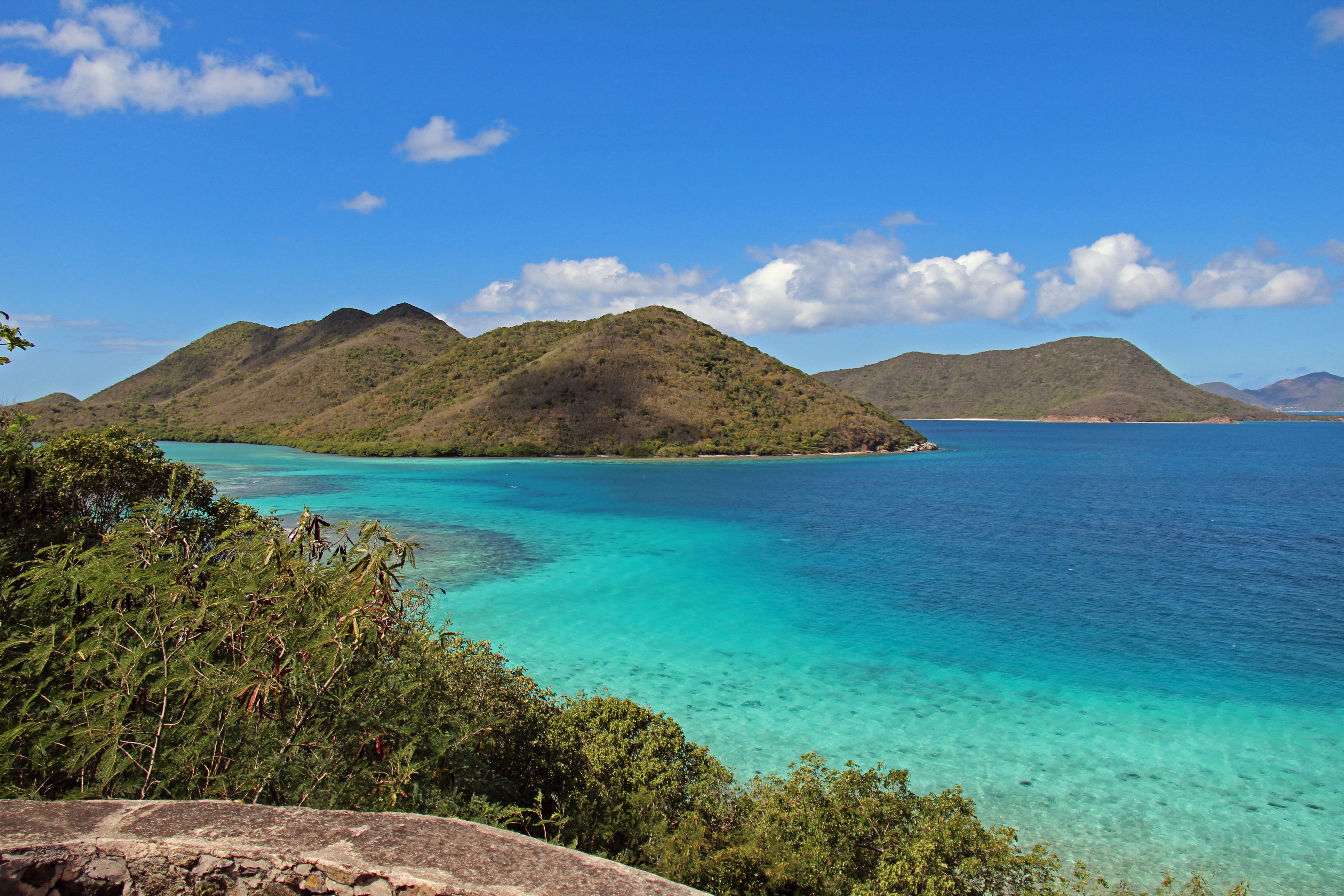 St. John